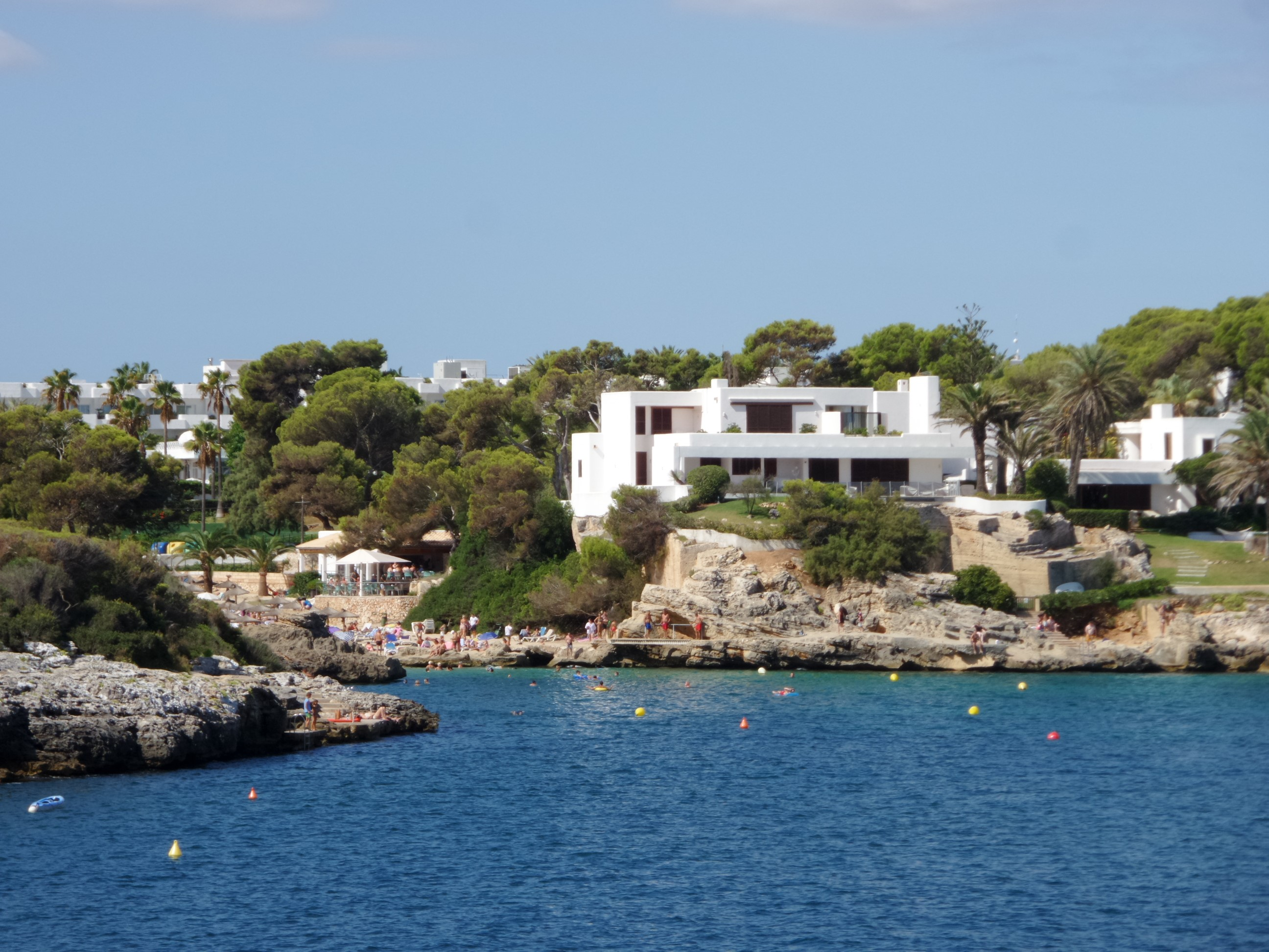 Caló d'es Pou (Strand) an der Cala Llonga (Cala d'Or); gesehen von Es Forti